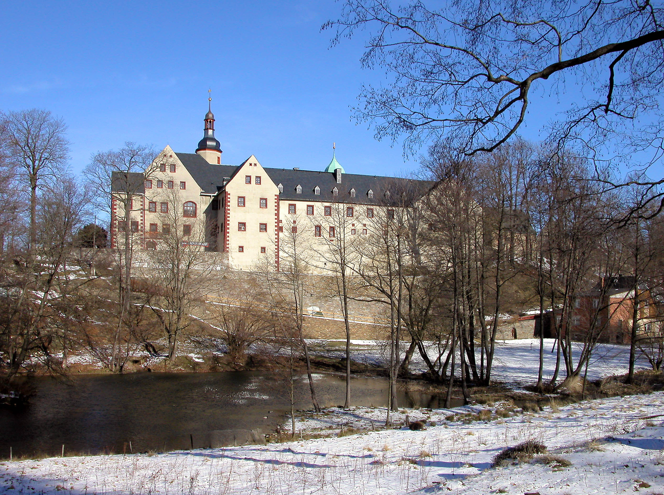 21.02.2004 09526 Pfaffroda, Am Schloßberg 8 (GMP: 50.696189,13.353422): Schloß, heutiger Bau von 1573-1578. Derzeit Altersheim. Sicht von Süden. [DSCN2431.TIF]20040221105.JPG(c)Blobelt